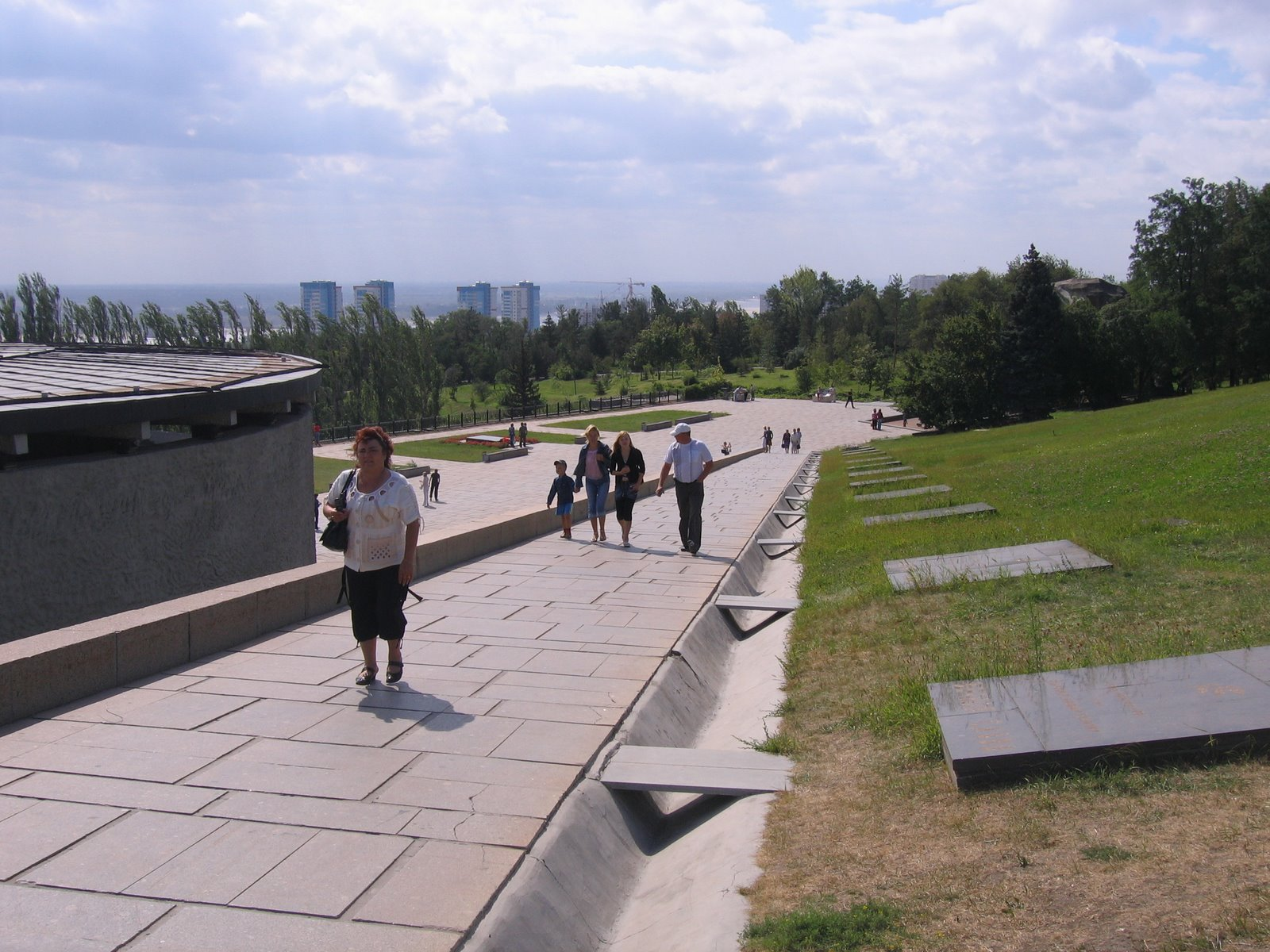 The way up to the statue "The Motherland Calls".